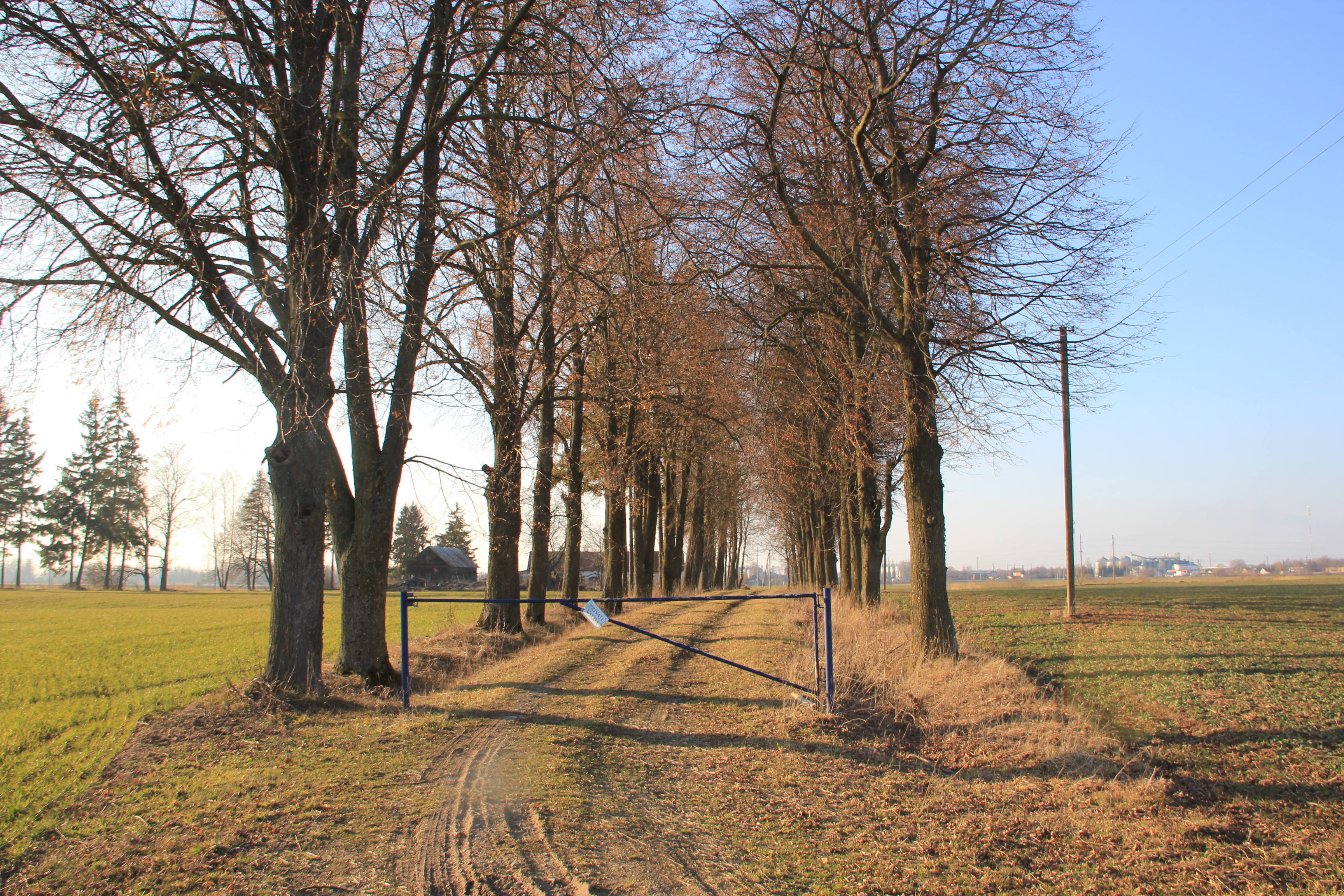 Goesų valdos 2016 m.